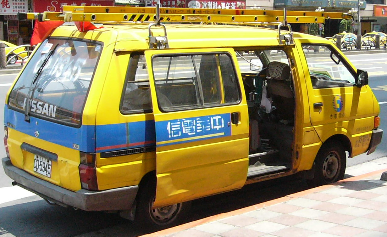 中華電信日產福滿多DX工程車CD-5945。